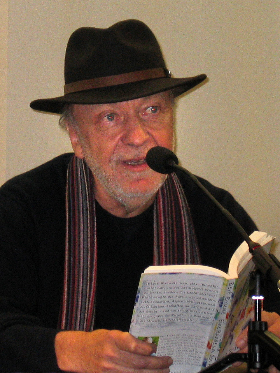 Der Autor Bert Brune bei einer Lesung in der Kölner Stadtbücherei